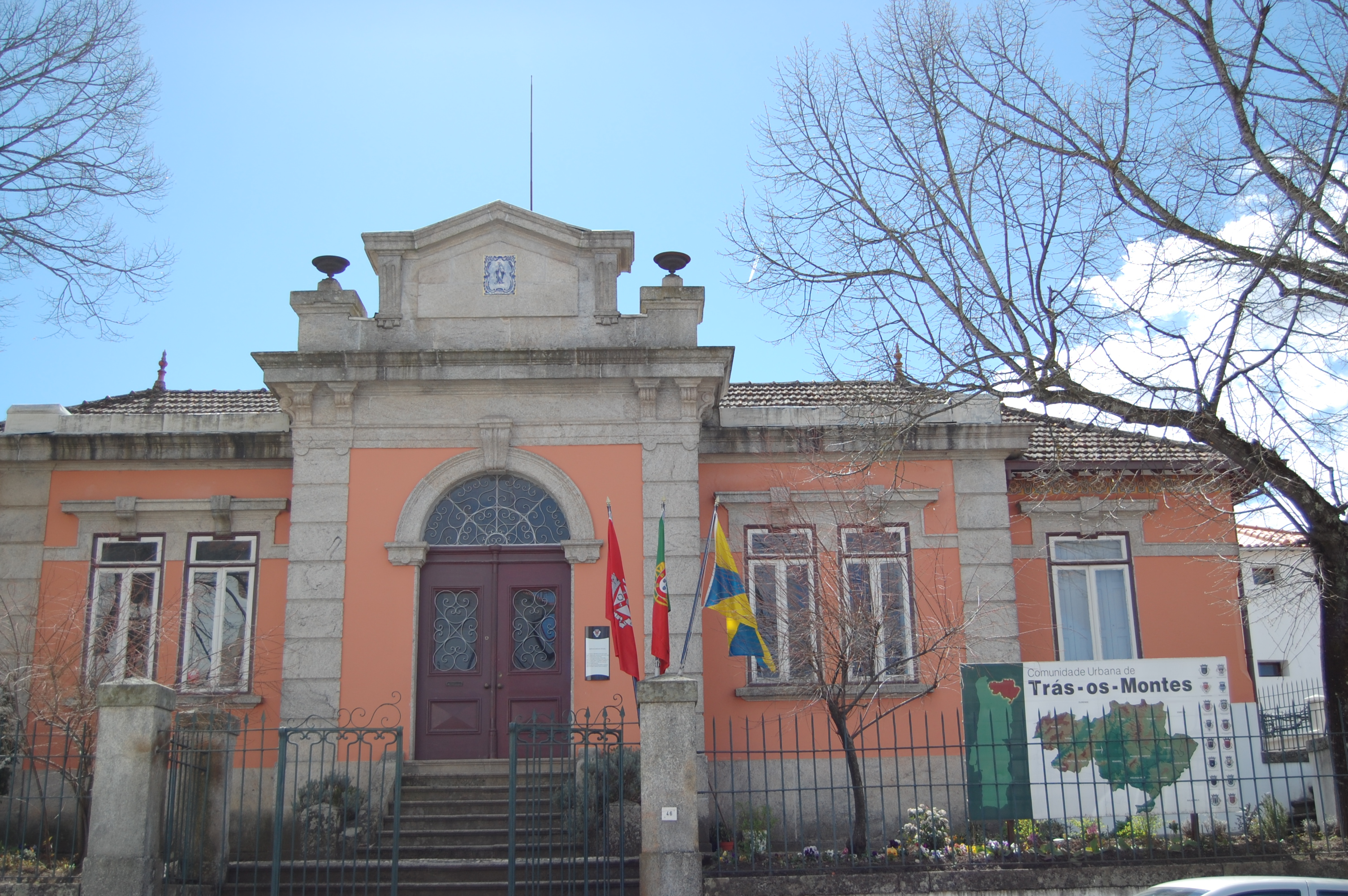 A cidade de Bragança, no nordeste de Portugal. Primeiro edifício do Banco de Portugal